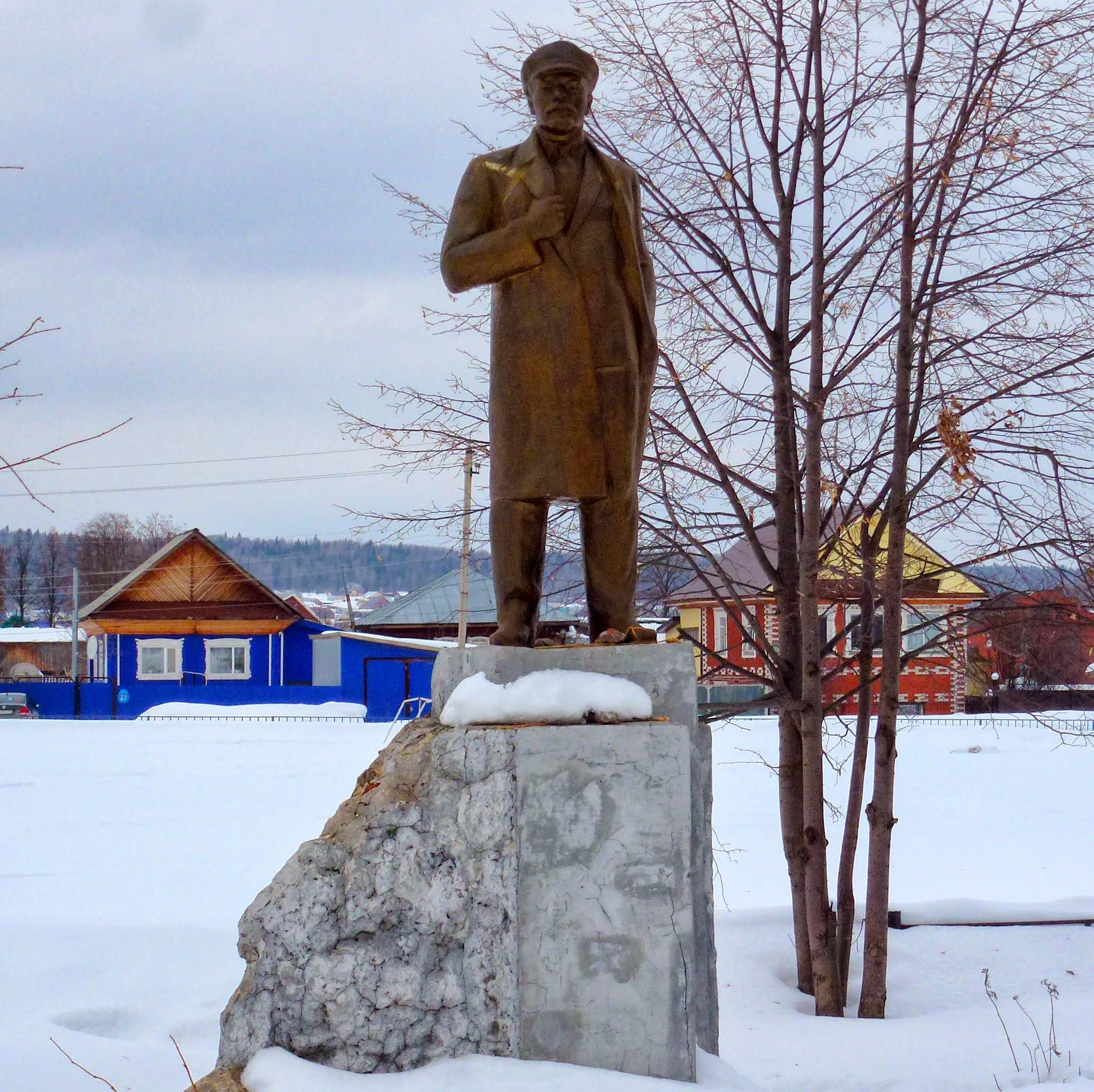 Памятник В.И.Ленину, Барда, Пермский край